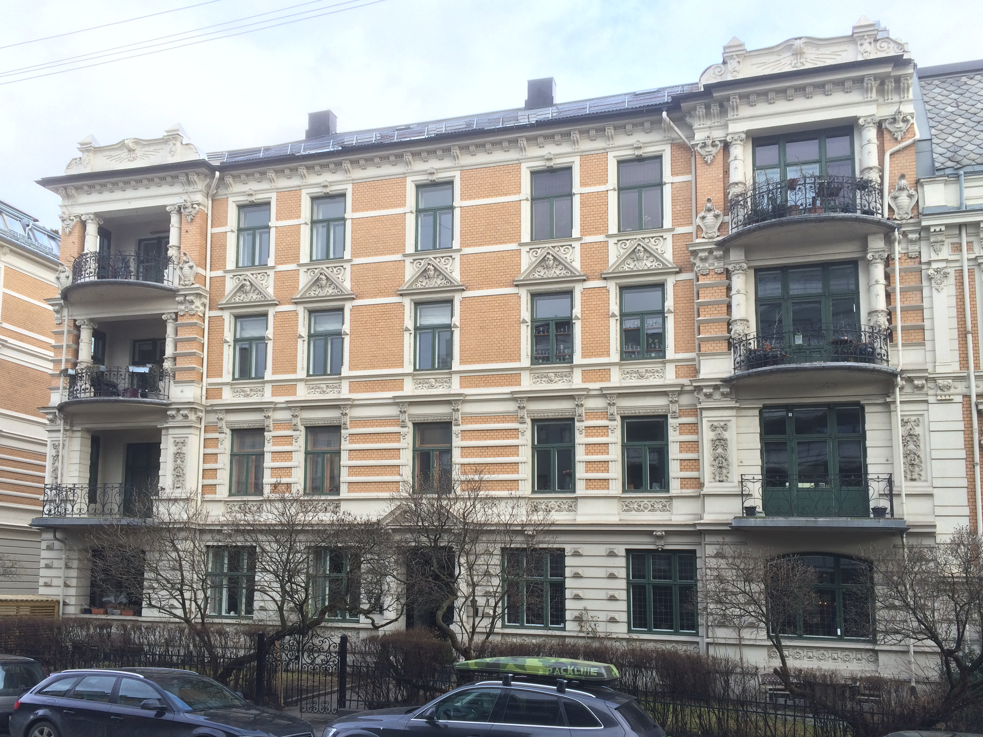 Camilla Colletts vei 1. Arkitekt: Carl Michalsen (1896–97).